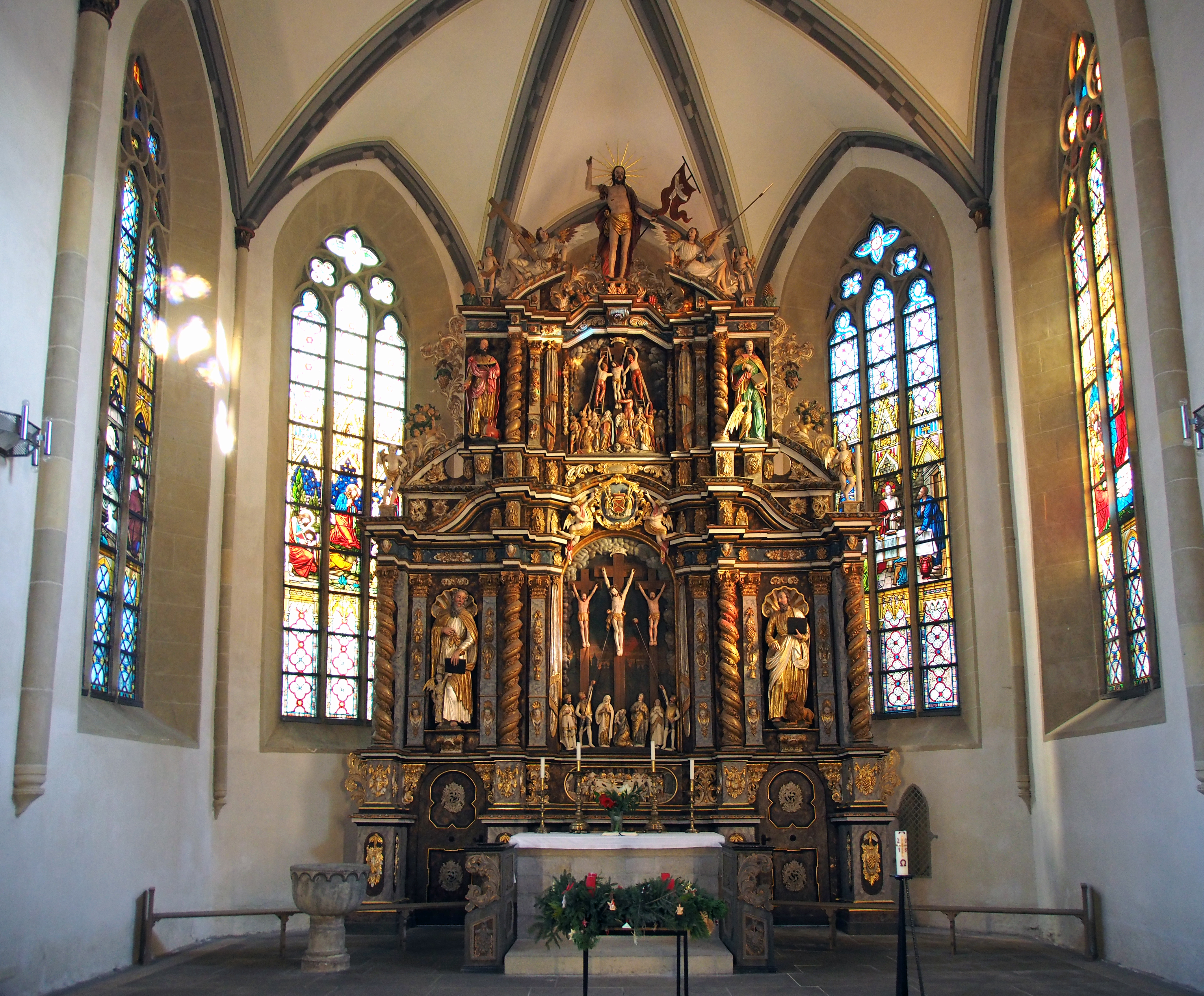 Altarraum mit Hochaltar in der St. Nikolai-Kirche, Quedlinburg, Sachsen-Anhalt